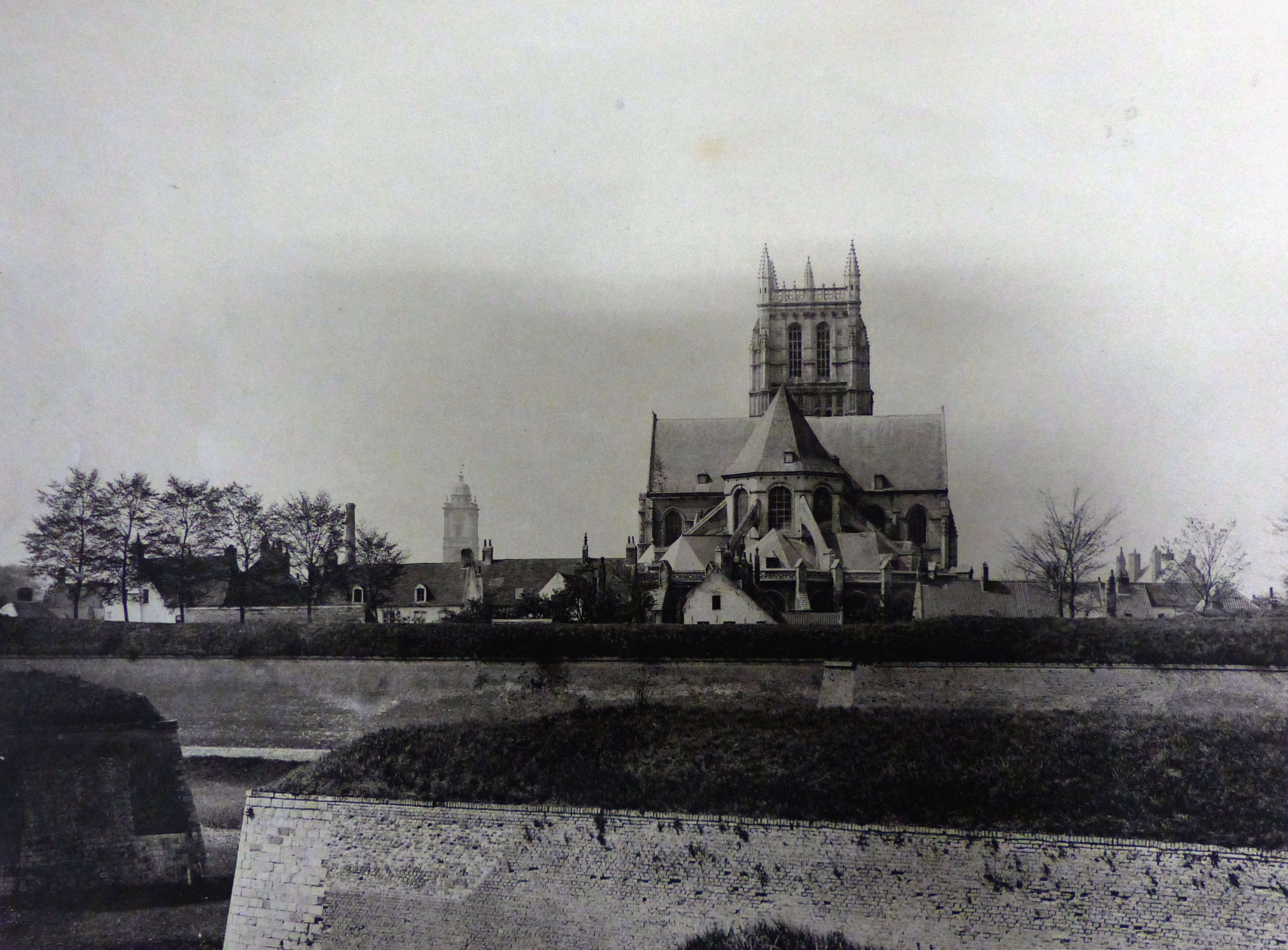 Collection Houpe N° 29 Eglise Saint-Pierre Bastion et Contre-Garde des Chanoines (Vue prise en 1893). Bibliothèque Municipale d’Aire-sur-la-lys.